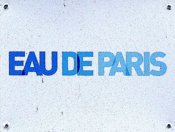 Avenue de Versailles (Paris)